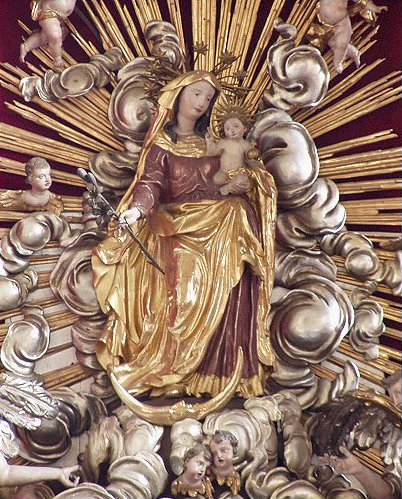 Gnadenbild (spätgotische Madonna) in der Wallfahrtskirche Schauersberg - Ausschnitt aus dem Hochaltar